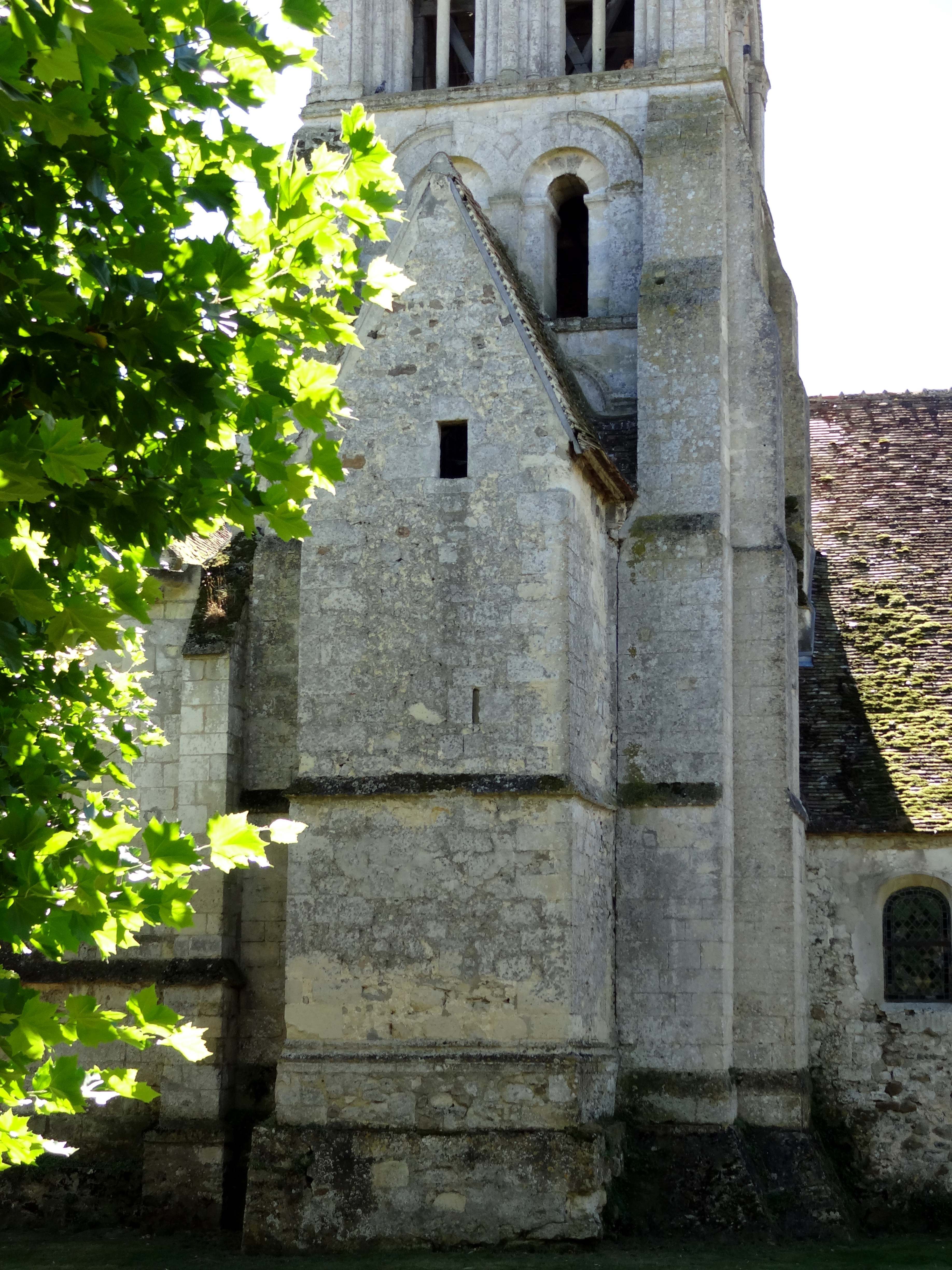 Église Sainte-Geneviève de Marolles - voir titre.